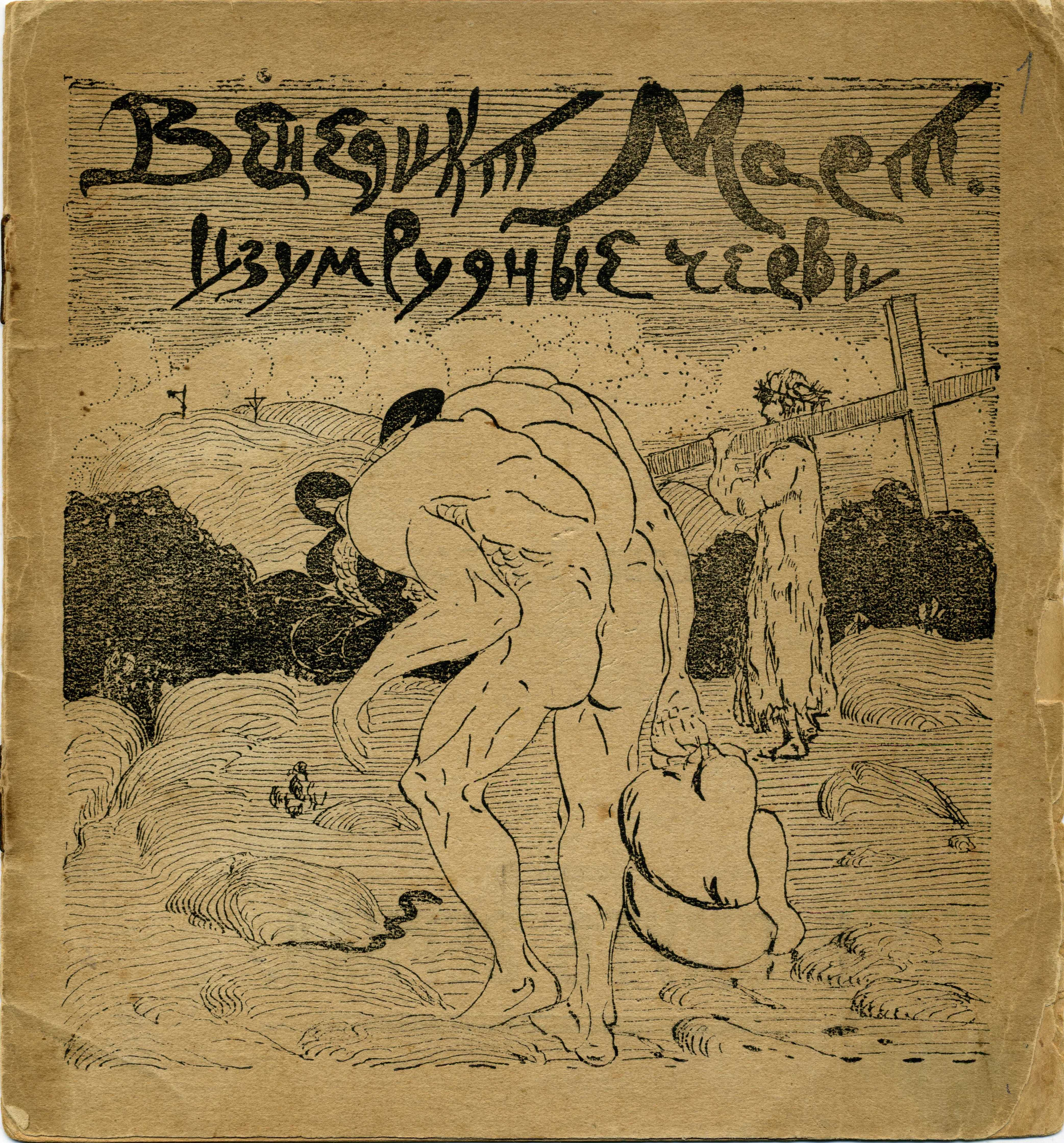 Couverture de l'ouvrage Vers d'émeraude de Venedikt Mart (1919)